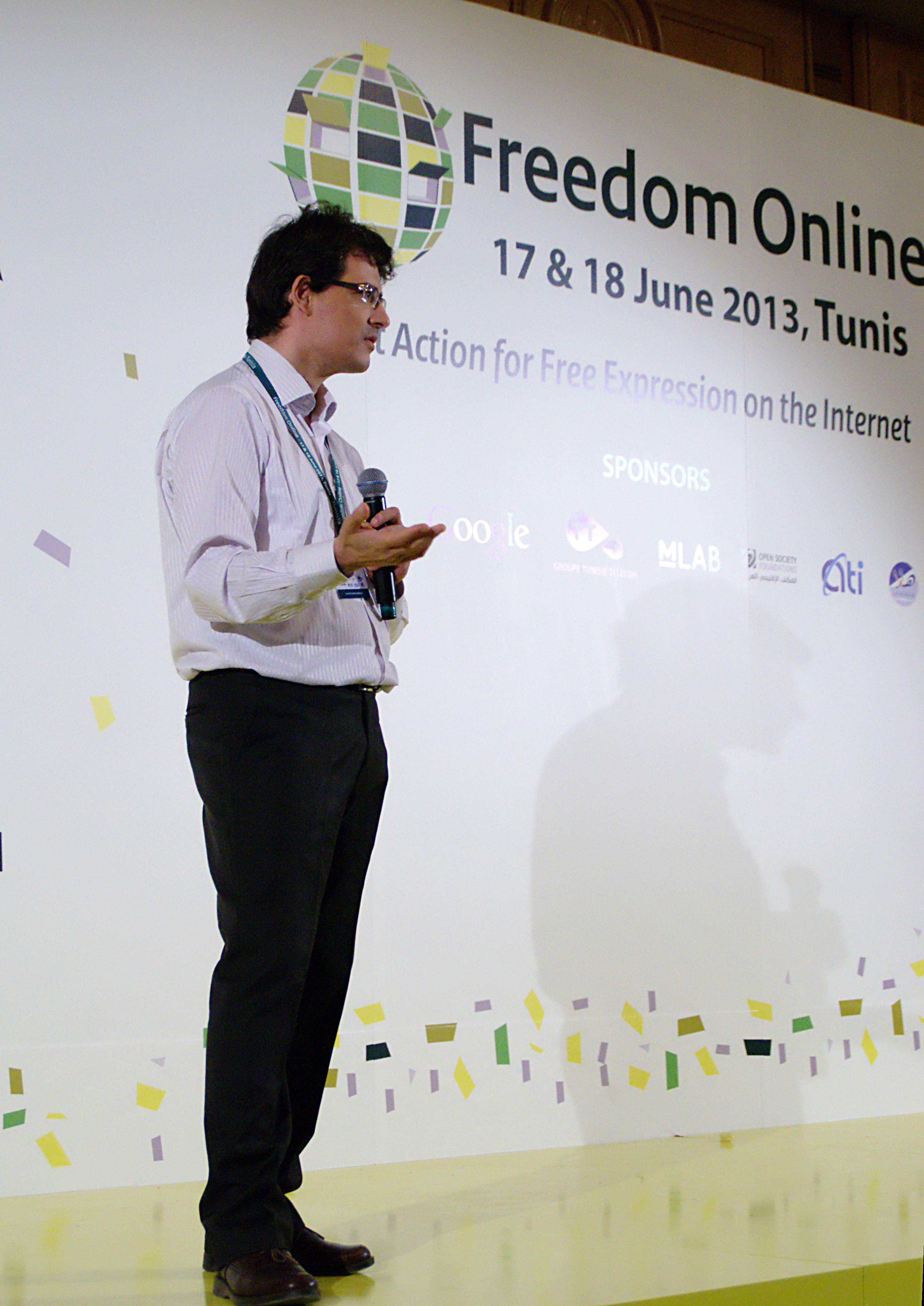 Moez Chakchouk, directeur de l'Agence tunisienne de l'Internet (ATI) au Freedom Online